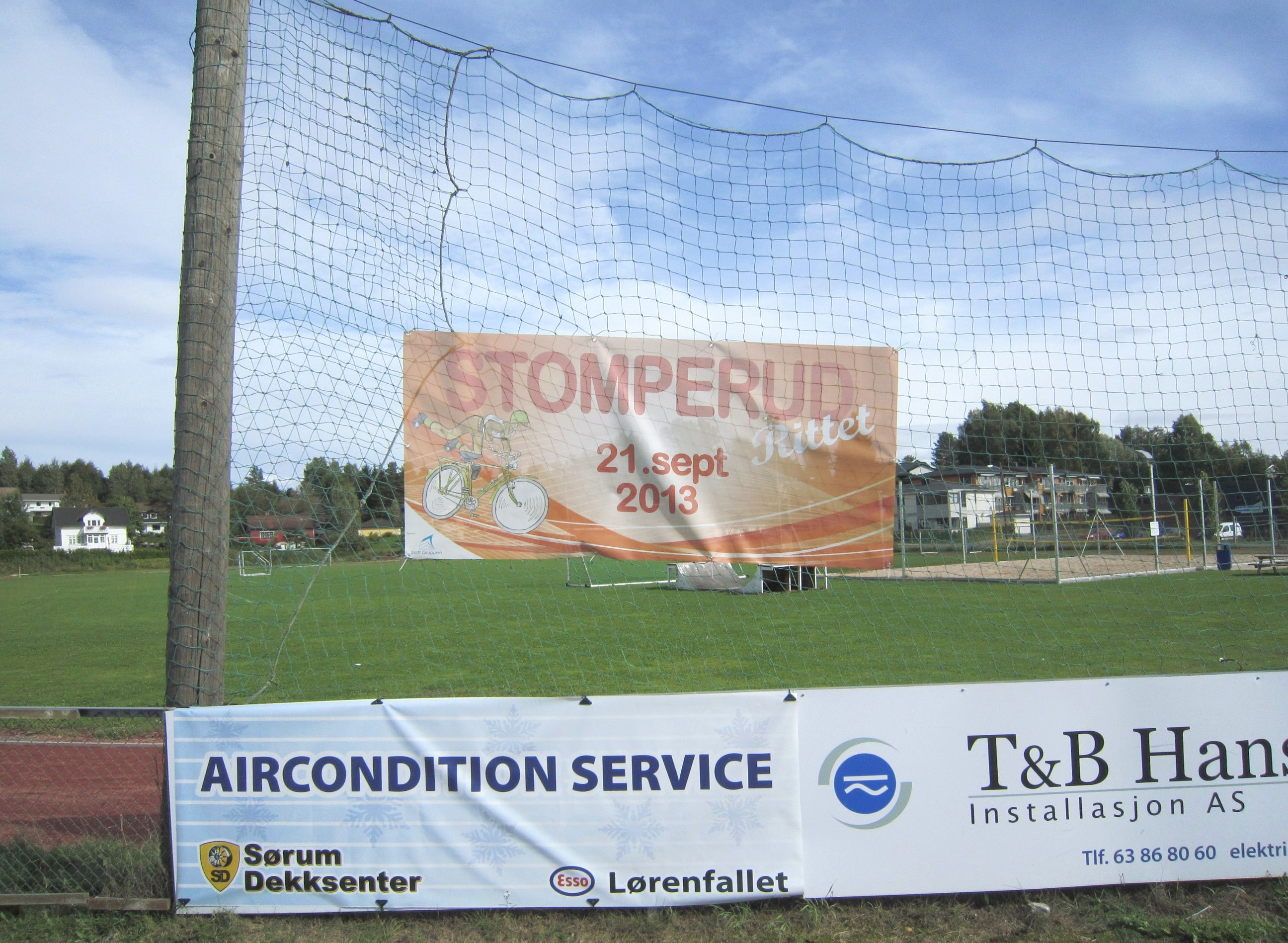 Ved idrettsplassen i Lørenfallet